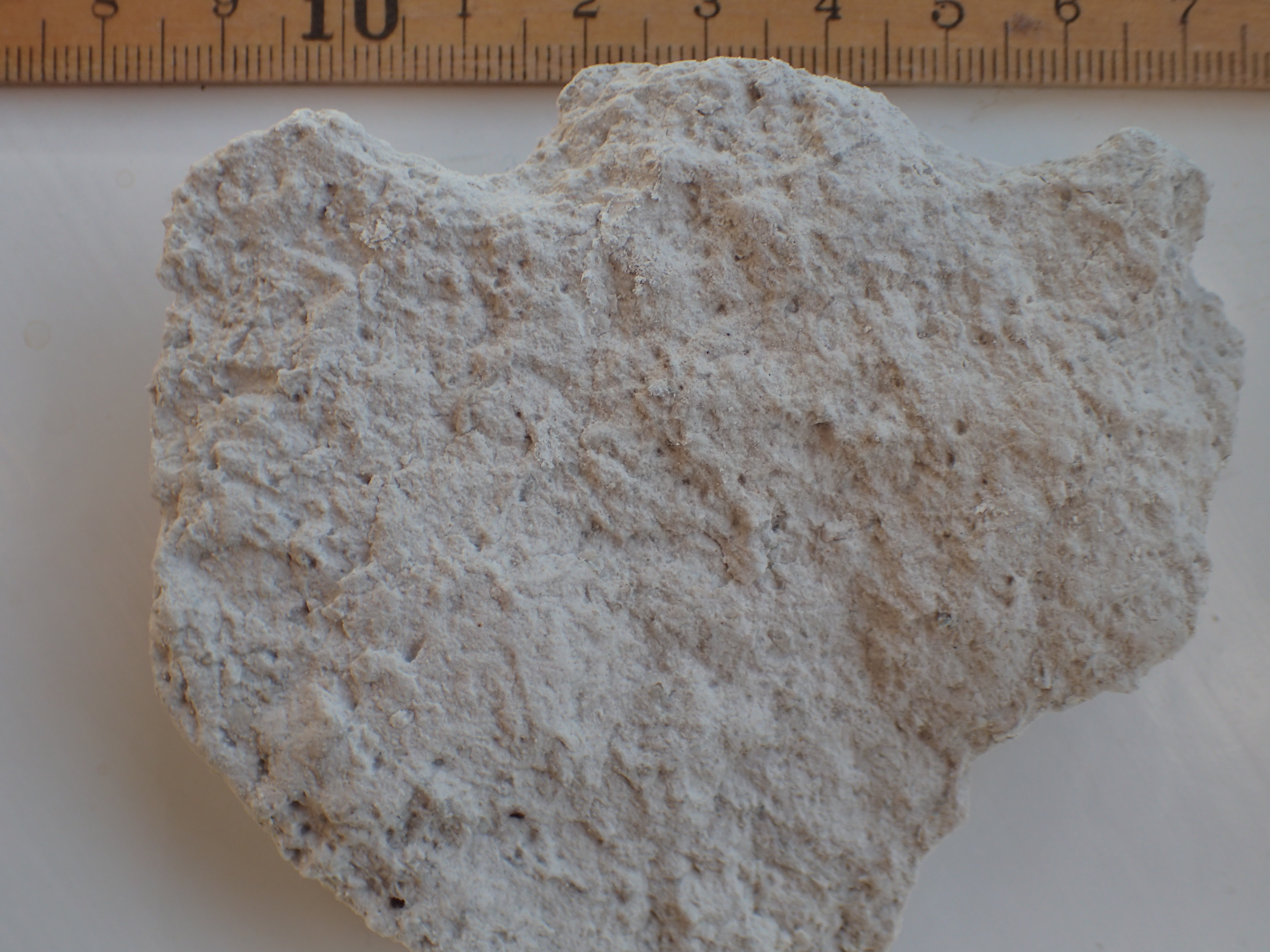 Boreprøve af bryozokalk fra Københavns sydhavn; skala i cm.